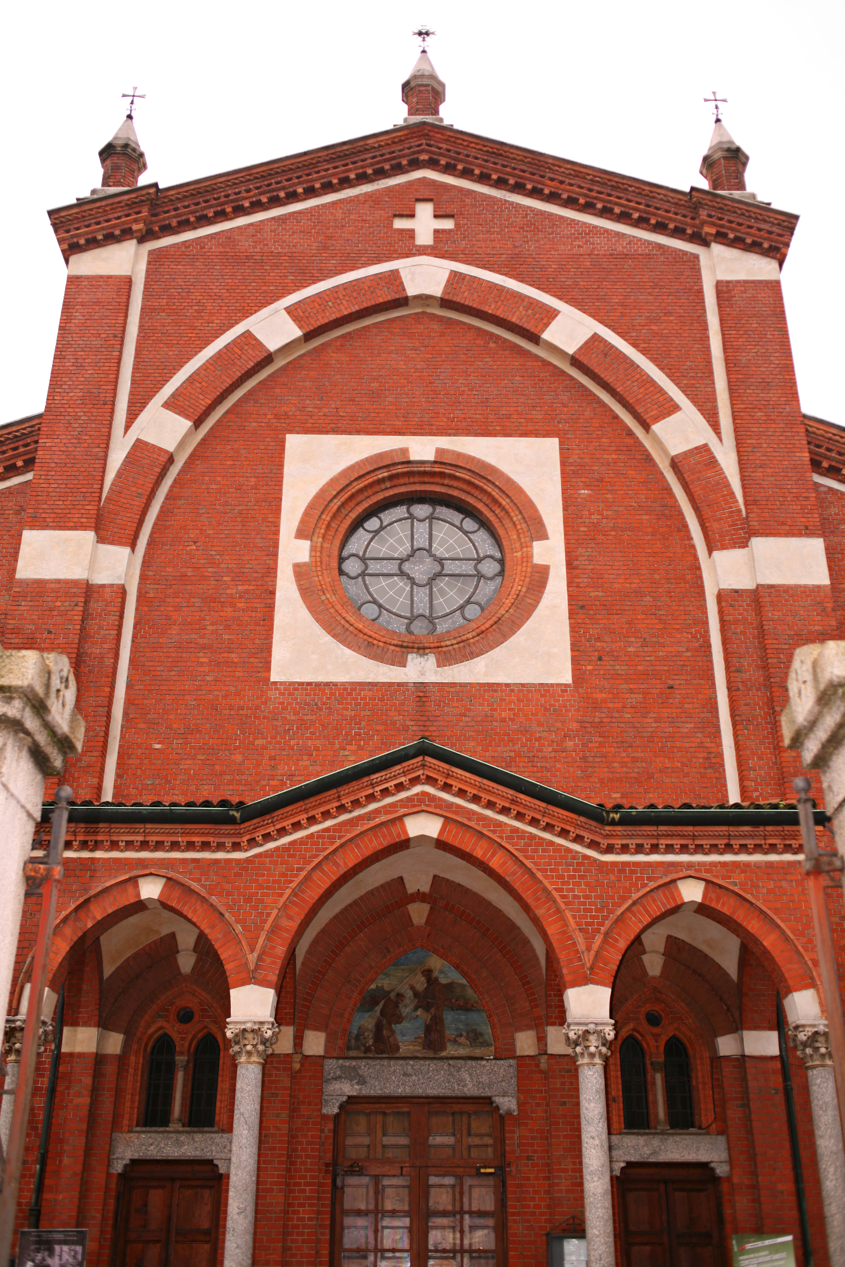 Chiesa del Rosetum di Milano, facciata